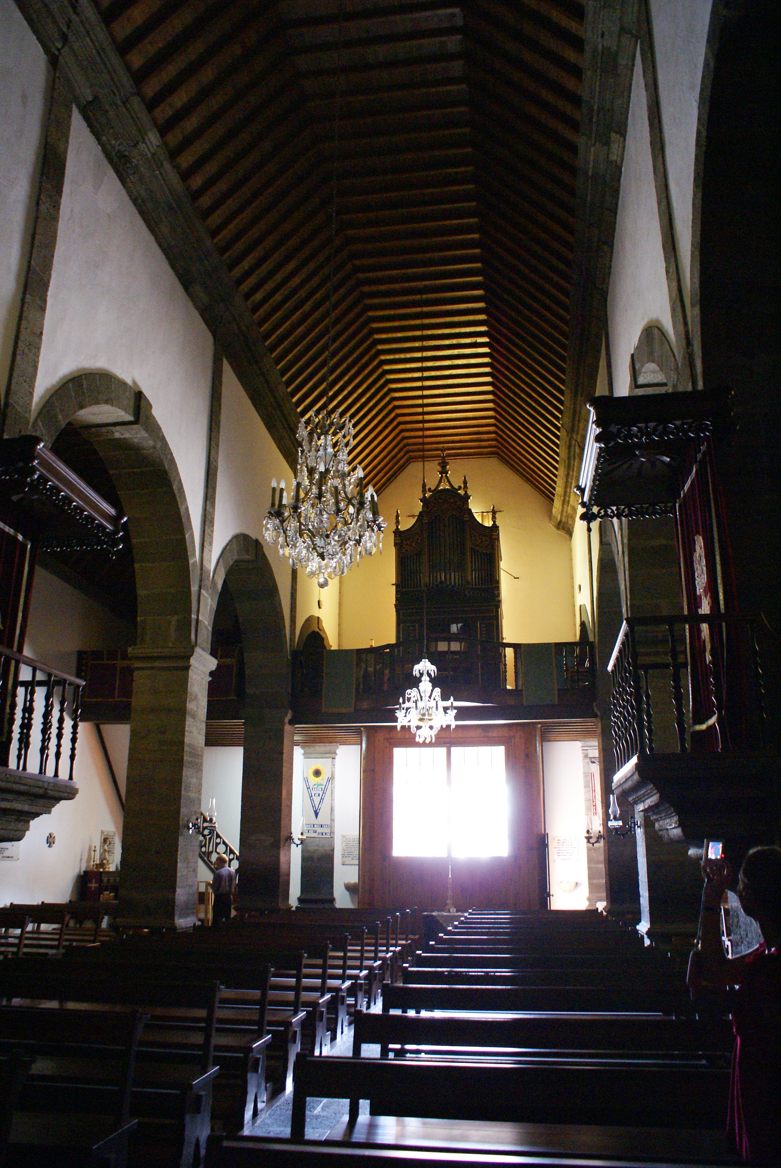 Igreja de São Jorge, Tecto em caixotão, Velas, Ilha de São Jorge, Açores